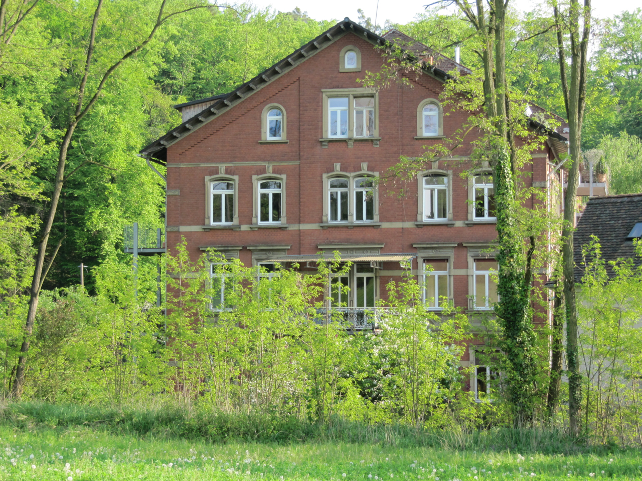 Neue Kaisermühle in Eberstadt, Darmstadt, Hessen